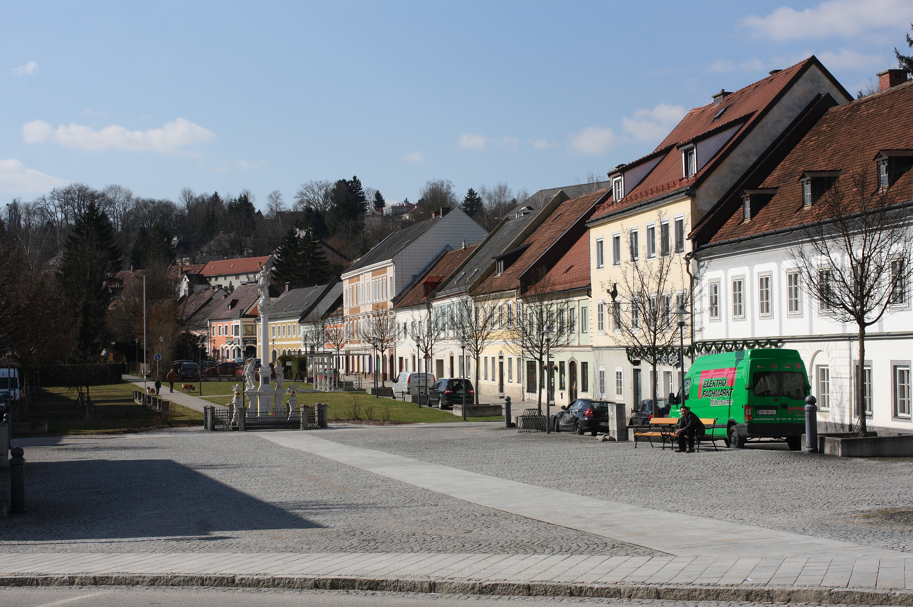 Der Wieserfeldplatz in Steyr (Stadtteil Steyrdorf)